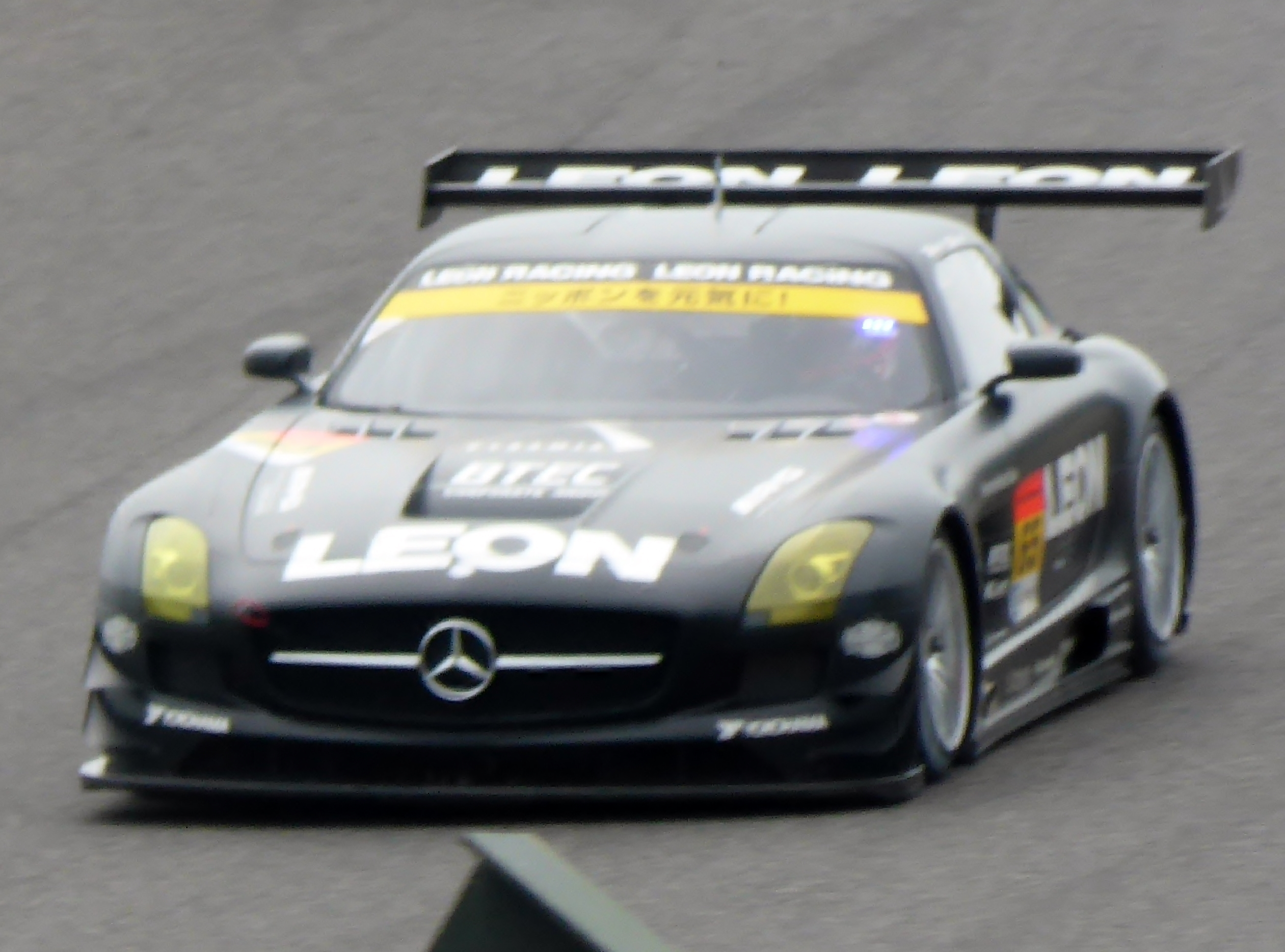 2014年鈴鹿テストにおいて65号車LEON SLSを撮影。